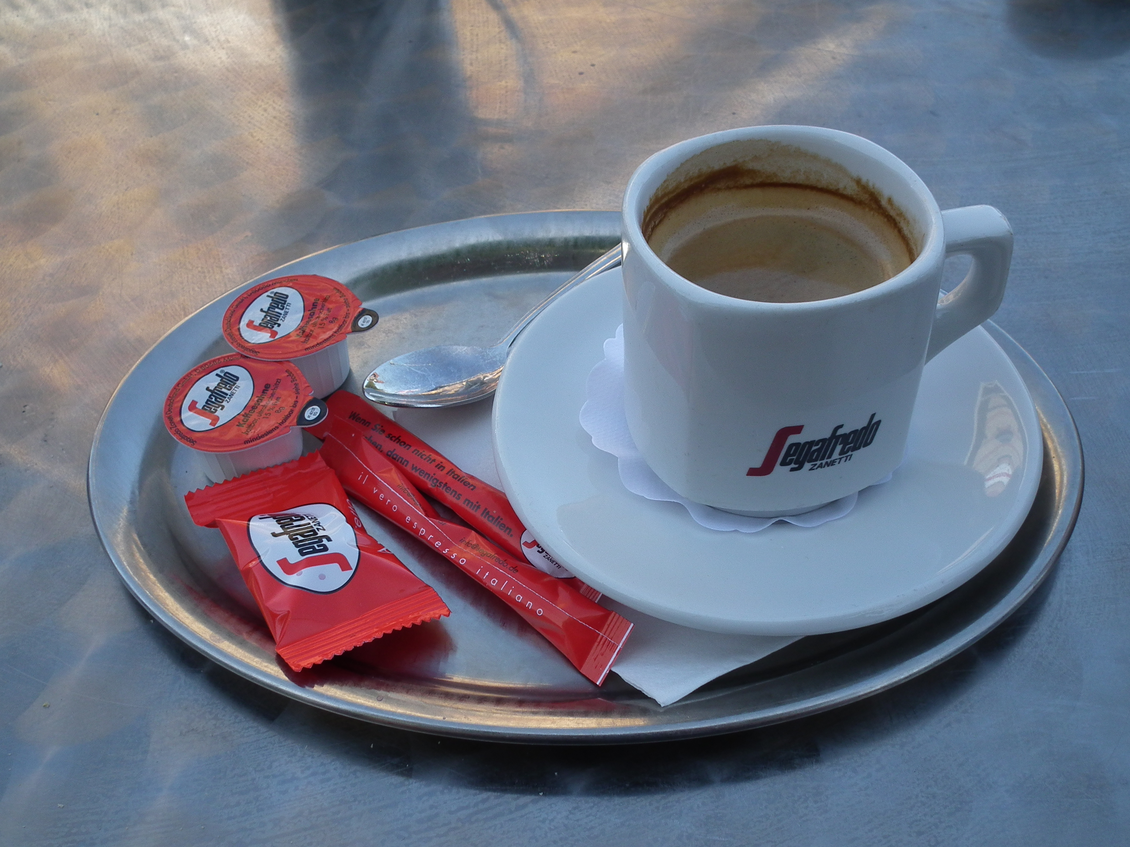 Tasse Segafredo-Kaffee mit Milch und Zucker